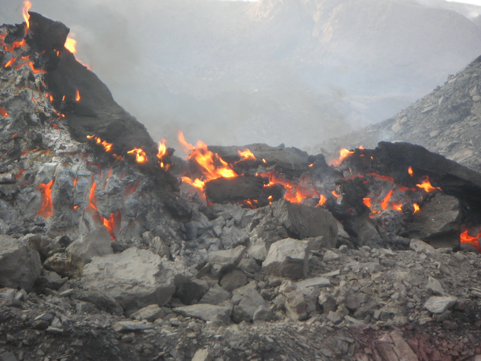 Kohelbrand in Xinjiang P.R. China